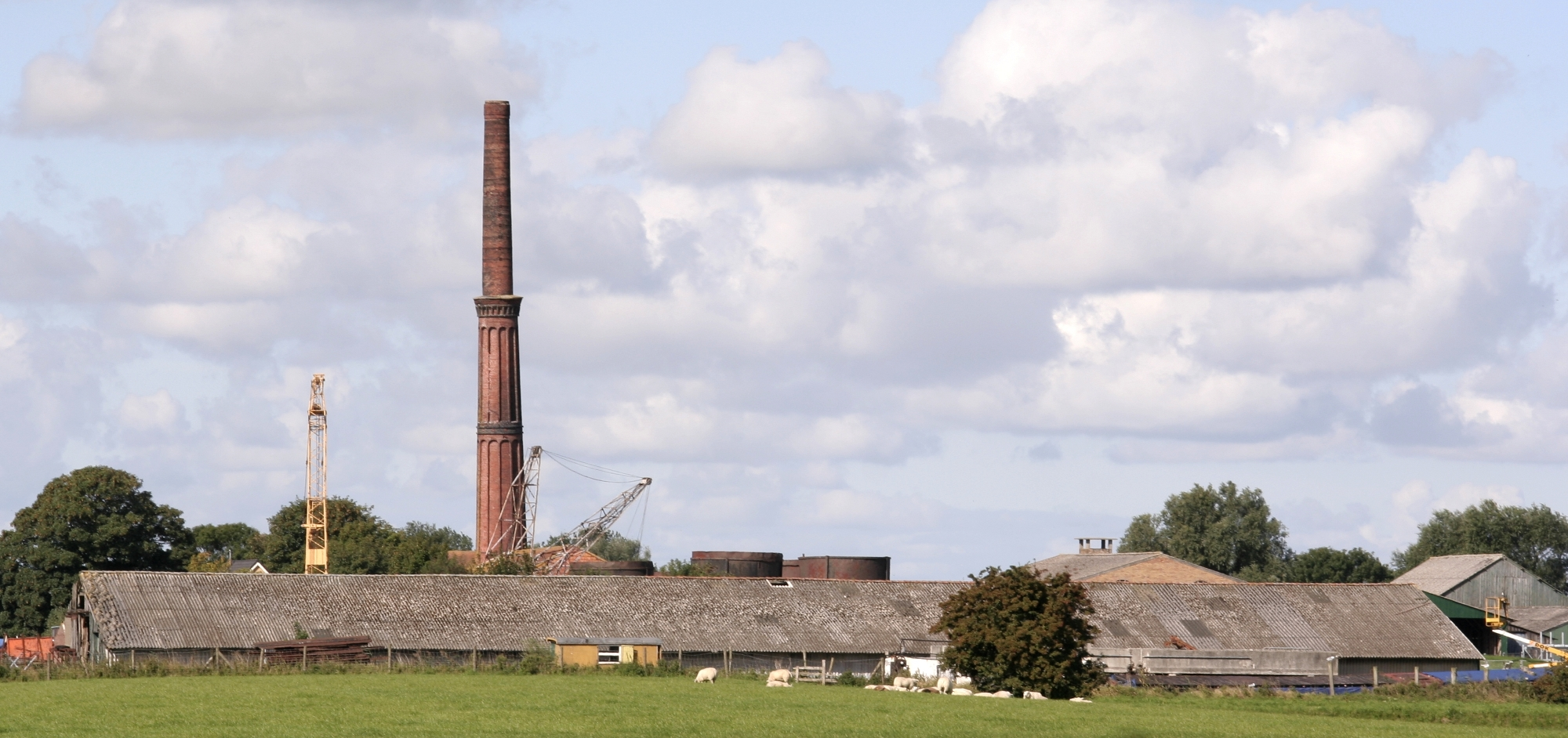 Steenfabriek in Oostrum nabij Dokkum.